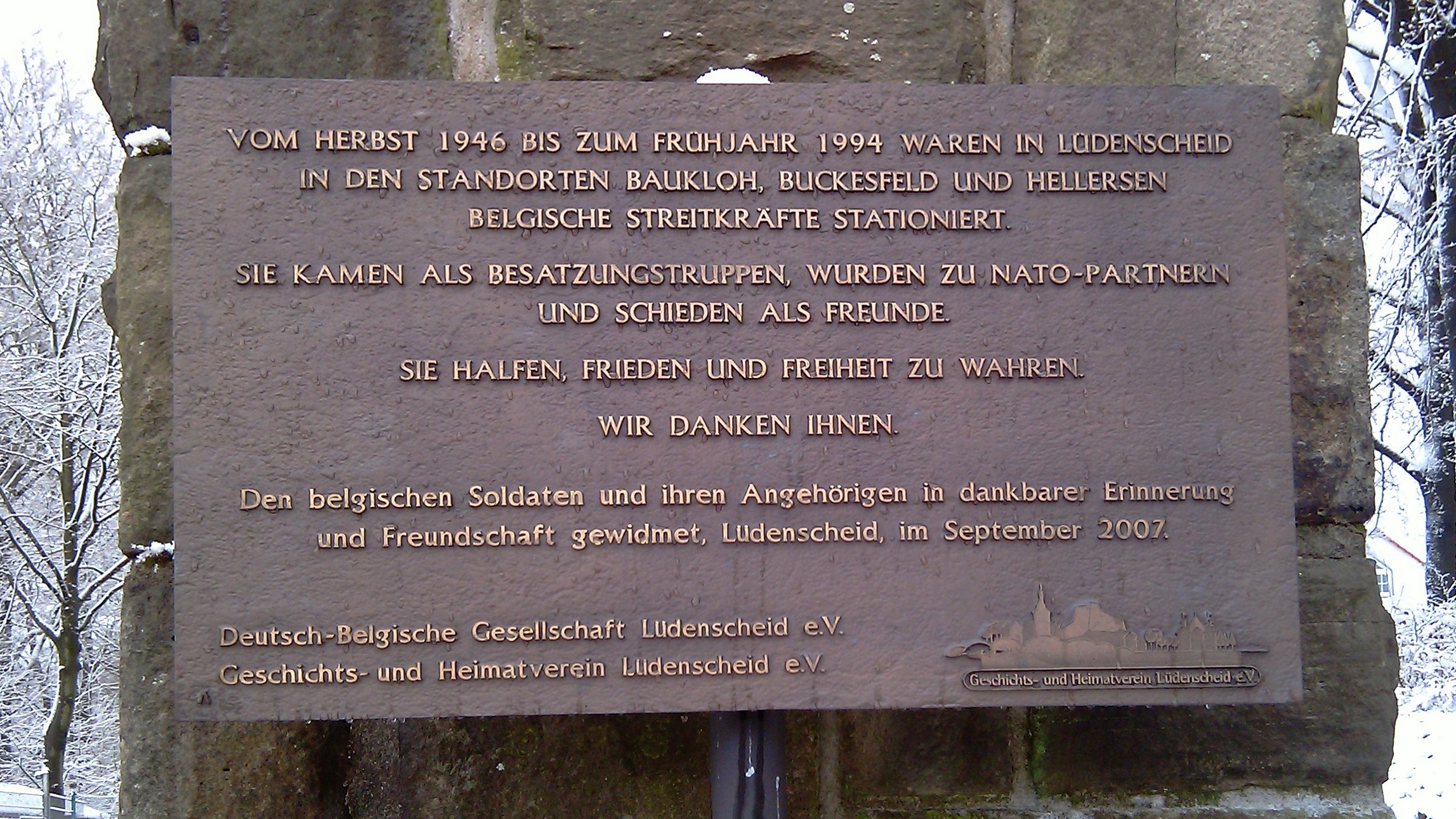 Denkmaltafel am Torbogen der Flakkaserne Buckesfeld für die belgischen Streitkräfte in Lüdenscheid